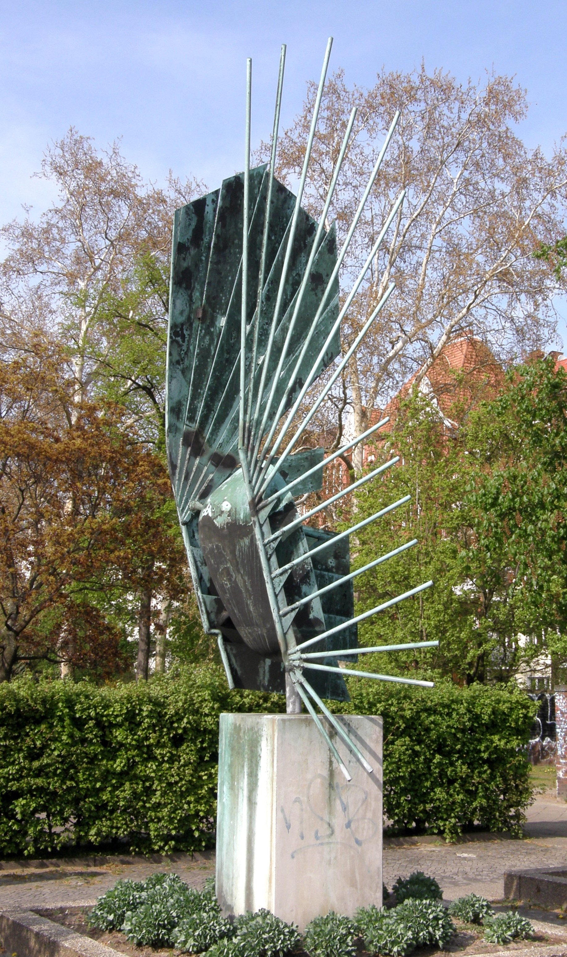 Skulptur "Phönix" von Bernhard Wilhelm Blank (1968, Bronze auf Betonsockel). Bundesplatz in Berlin-Wilmersdorf.